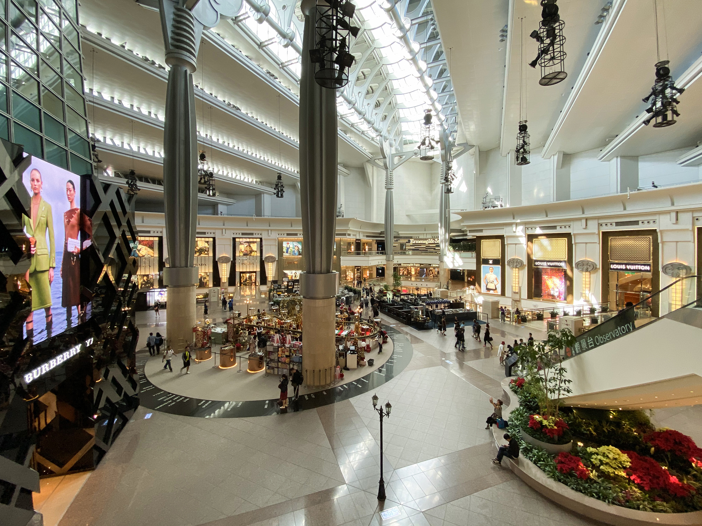 Taipei 101 Mall